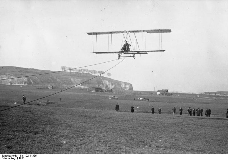 Segelflugstart mit dem Auto in Frankreich ! Das Starten von Segelflugzeugen mittels Auto wird in Frankreich und England auf flachem Gelände gern geübt. In Deutschland ist das Auto als Startmittel verboten, da sich bei diesem Start schon zu viel Unglücksfälle mit tödlichem Ausgang ereigneten. Information added by Wikimedia users.The Bardin Alérion glider, designed and built by René Bardin, being launched / towed by a car ca. 1923.